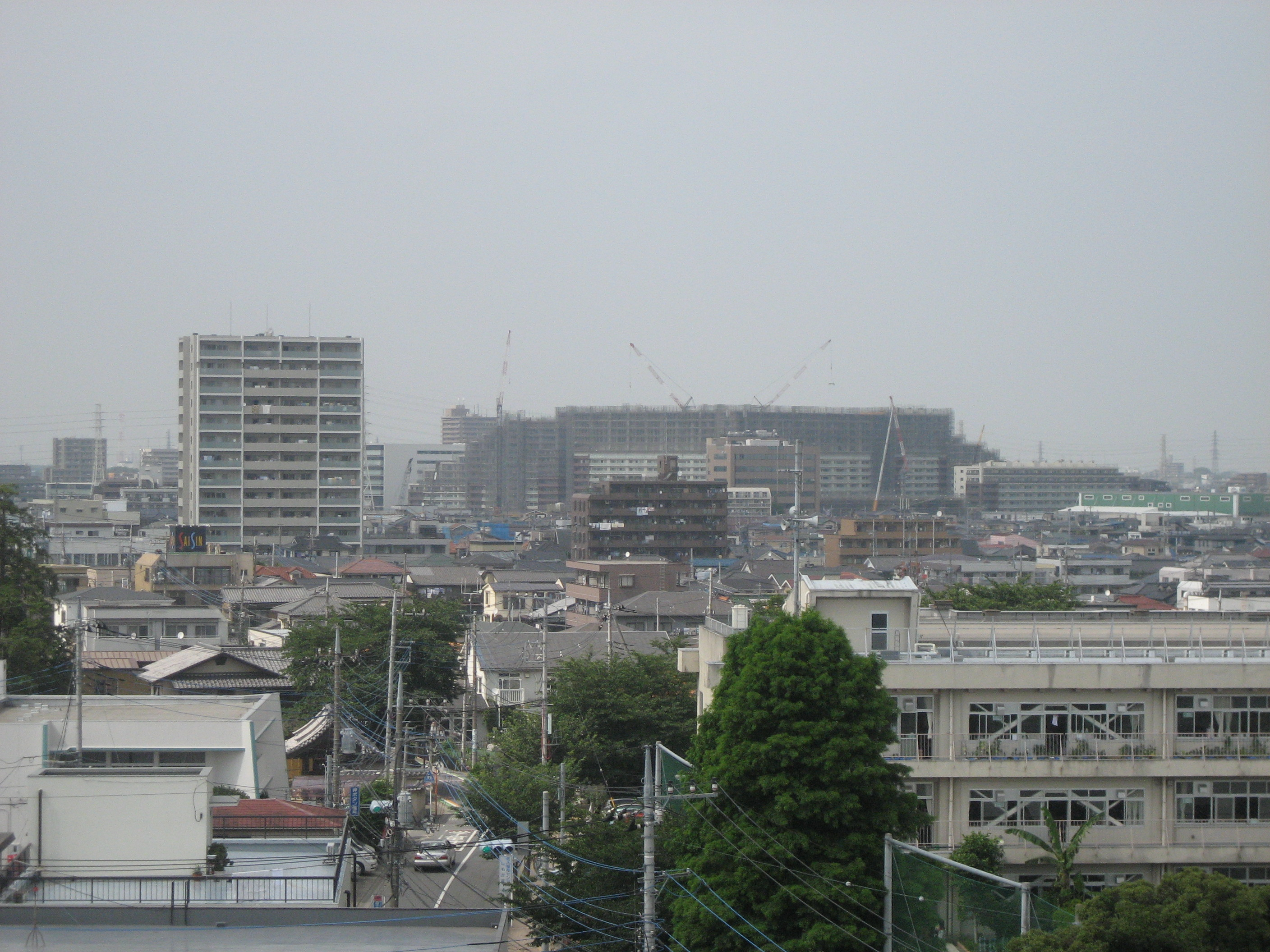 さいたま市北区日進駅方面